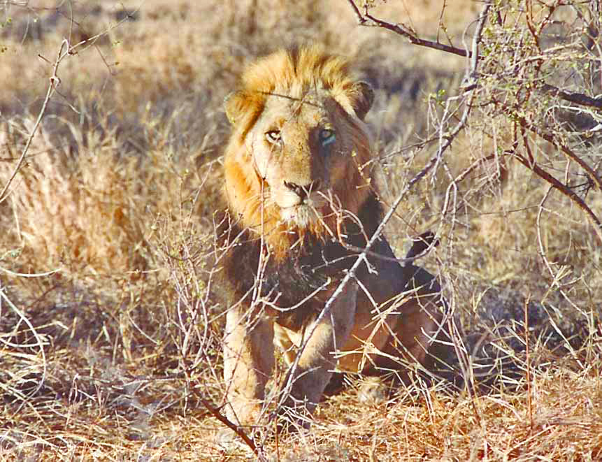 Krügerpark Léiw 2h.